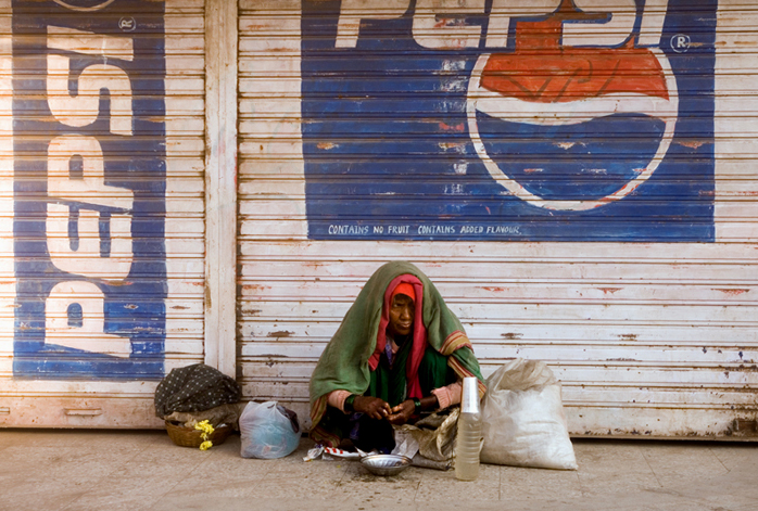 A woman waking up on a sidewalk in Bijapur, India, under a Pepsi advertisement.